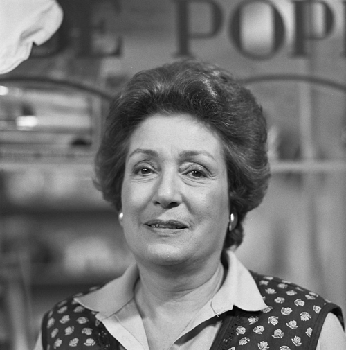 Lies de Wind.